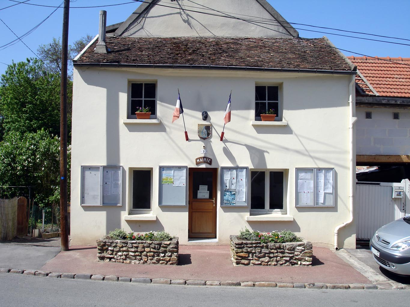 Mairie de Vaudherland (Val-d'Oise), France